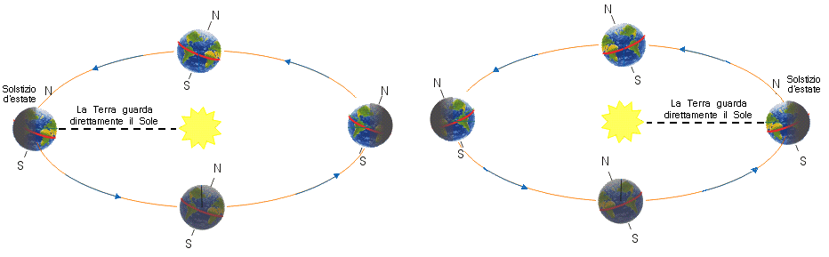 Dopo circa 13000 anni, il solstizio non si verifica più alla sinistra del sole, bensì alla sua destra